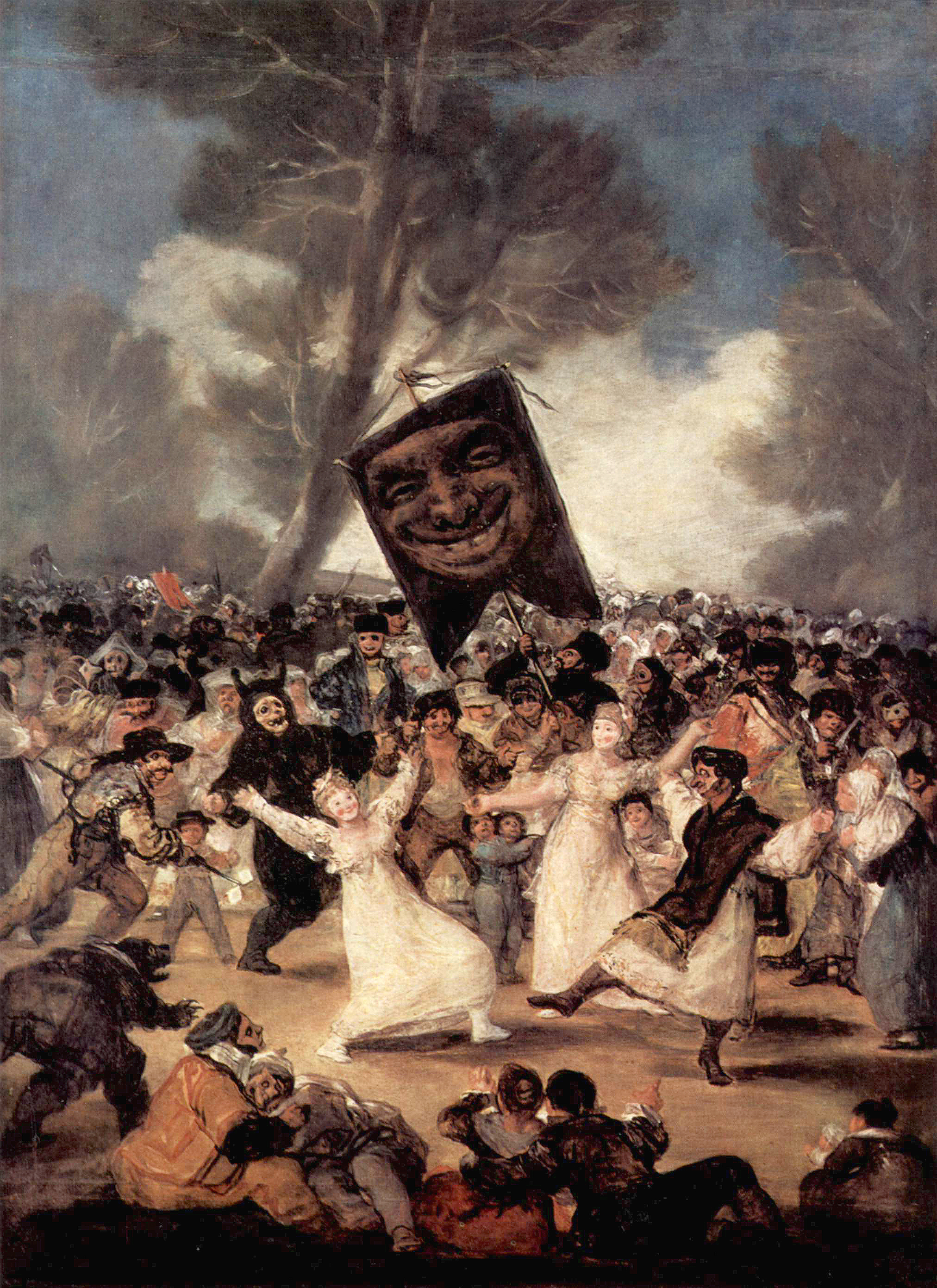 Karnevalsszene.